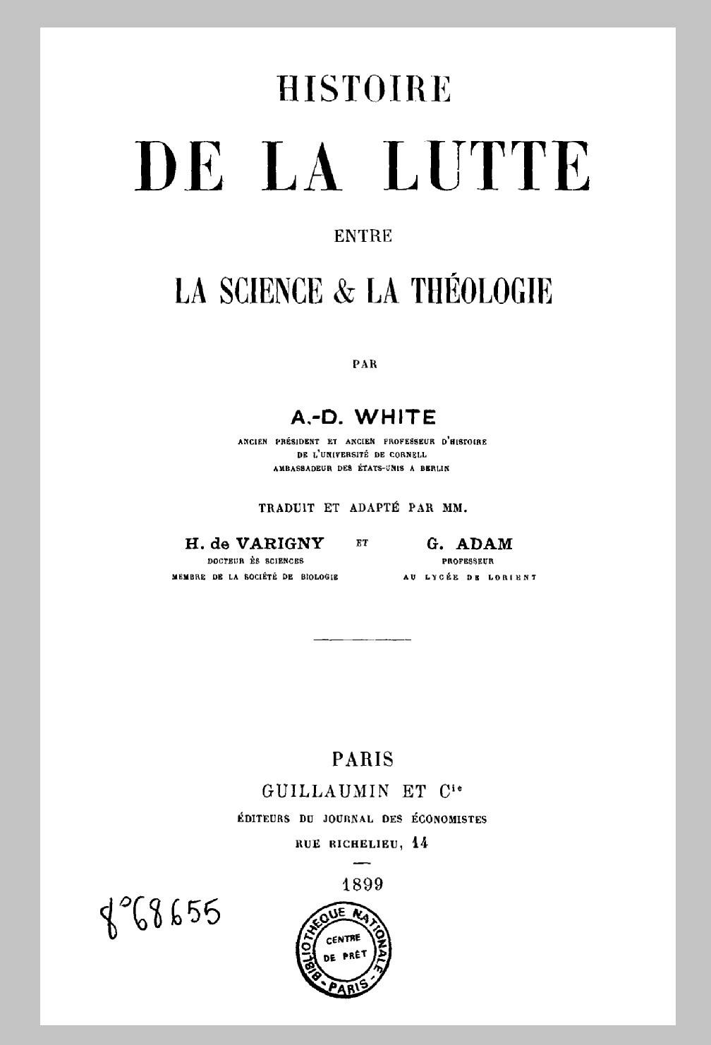 Page de titre de Histoire de la lutte entre la science et la théologie, ouvrage d'Andrew Dickson White, trad. fr. de 1899.